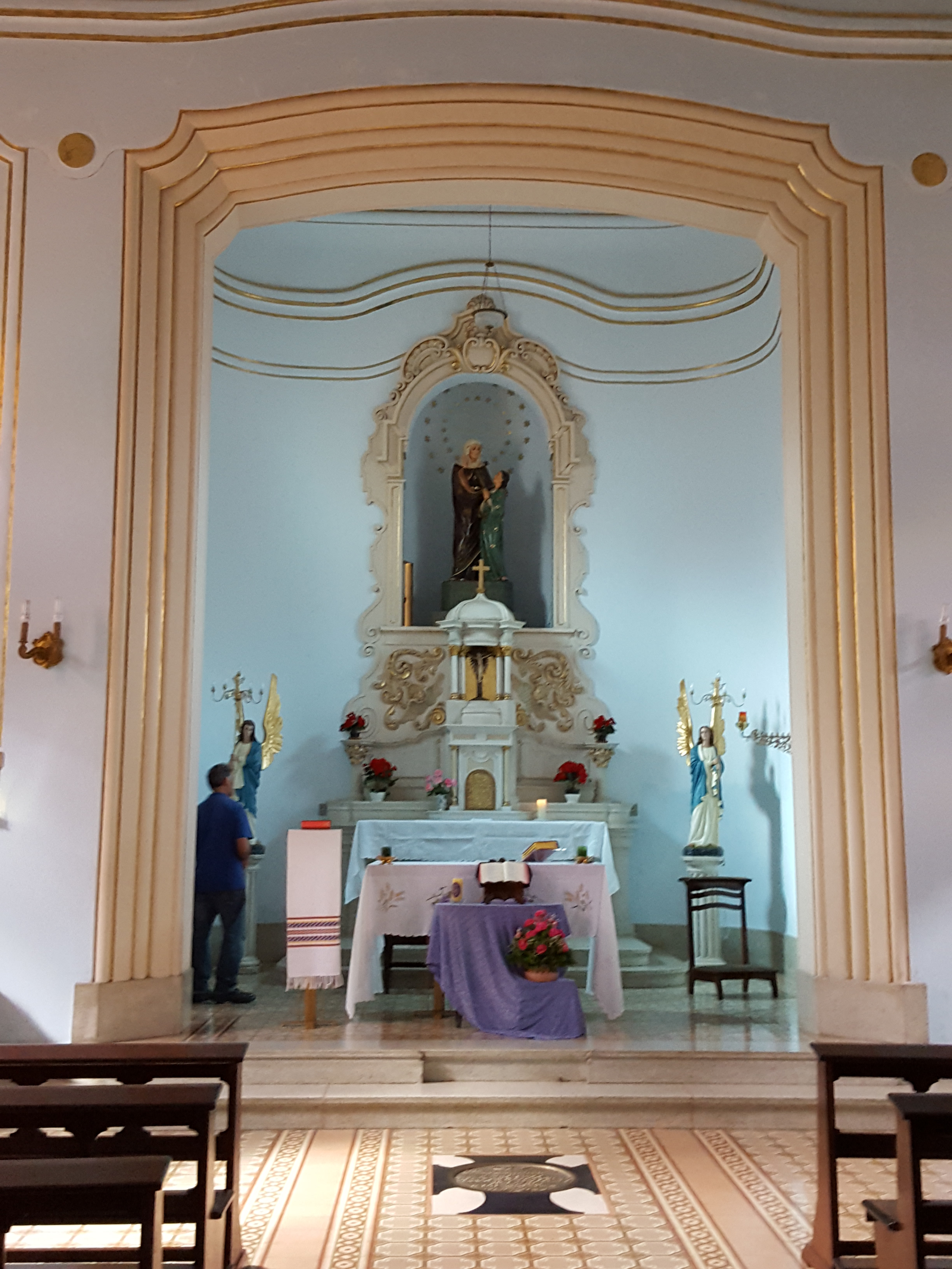 Santuário da Capela Saint Anna, no Instituto Padre Chico, em São Paulo (SP), Brasil.